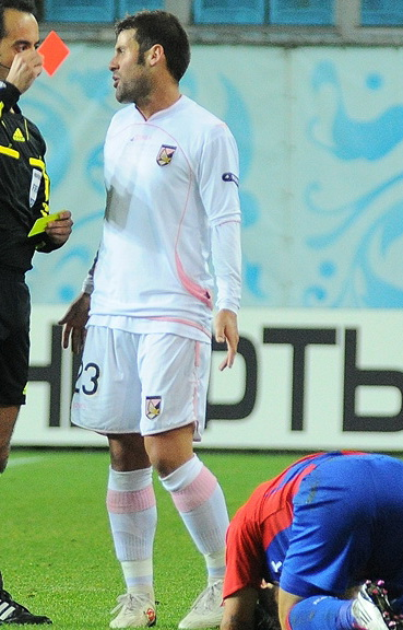 Antonio Nocerino